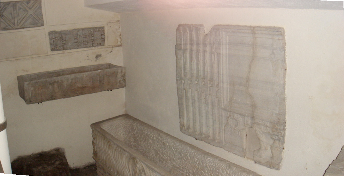 Roma, Santa Maria in Domnica: cripta